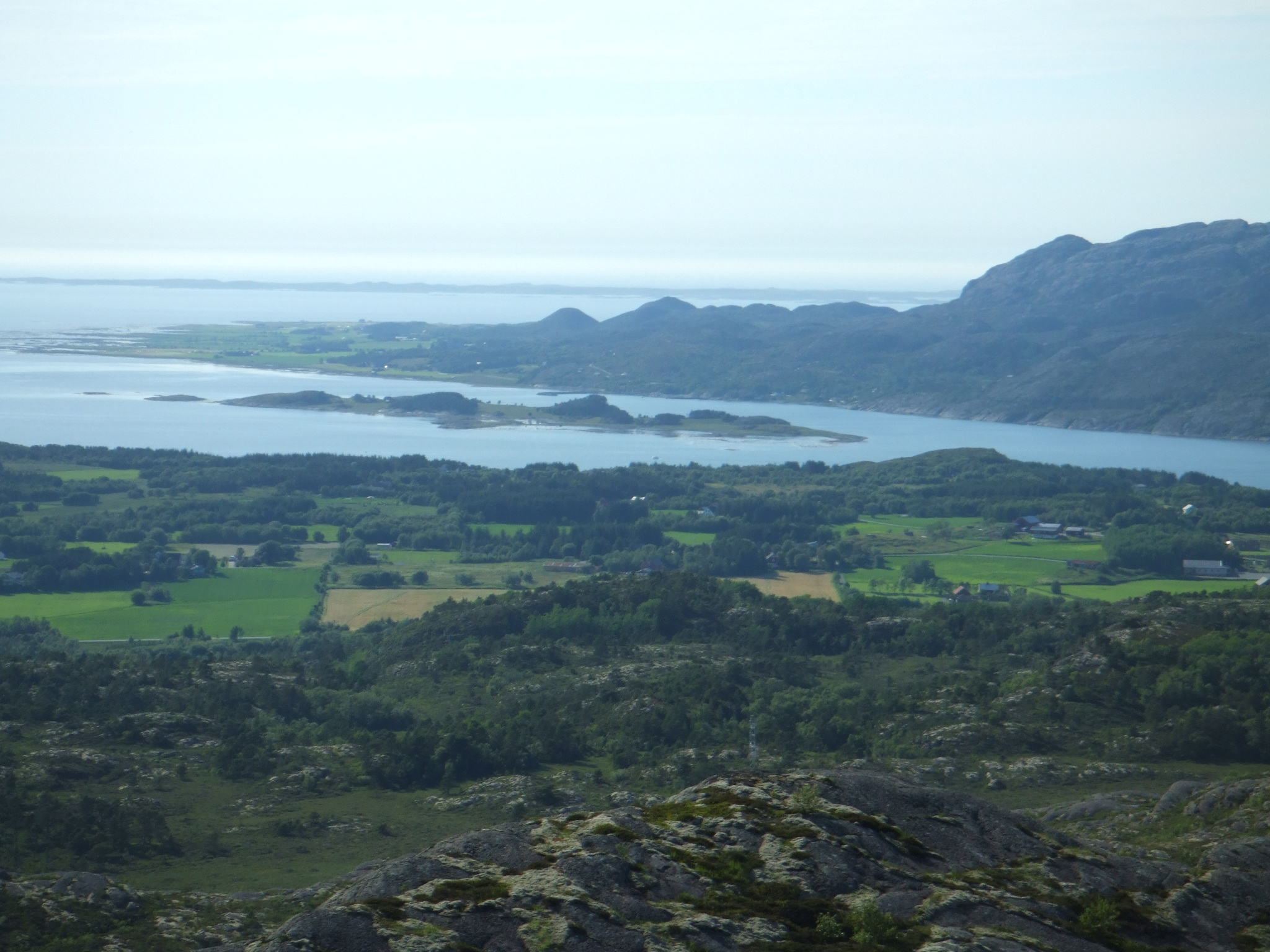 Bjugn